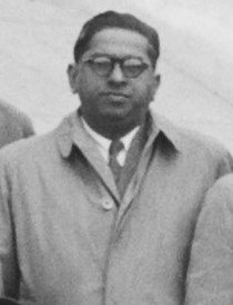 Collectie / Archief : Fotocollectie Anefo Reportage / Serie : [ onbekend ] Beschrijving : Aankomst West Indische delegatie Datum : 11 juni 1946 Trefwoorden : AANKOMST, delegatie Fotograaf : Bennekom, Ad van / Anefo Auteursrechthebbende : Nationaal Archief Materiaalsoort : Negatief (zwart/wit) Nummer archiefinventaris : bekijk toegang 2.24.01.03 Bestanddeelnummer : 901-8096 Reacties Geplaatst door Geschiedenis Overzeese Gebiedsdelen op 15 augustus 2017 - 18:55. V.l.n.r. van rechts naar links: F.J.G. Kwartsz, C.A. Eman, E.J. Jonkheer, dr. M.F. da Costa Gomez, W.L. Plantz (allen afkomstig van Curaçao) H. Miskin, S. Rambaran, A.M. van Eyck, J.C. Ho A Sjoe, F.H.R. Lim A Po, A.R.L. Smit (allen afkomstig uit Suriname) Plaats: Schiphol